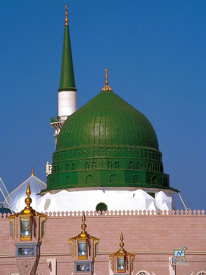 ولادته في المدينة المنورة